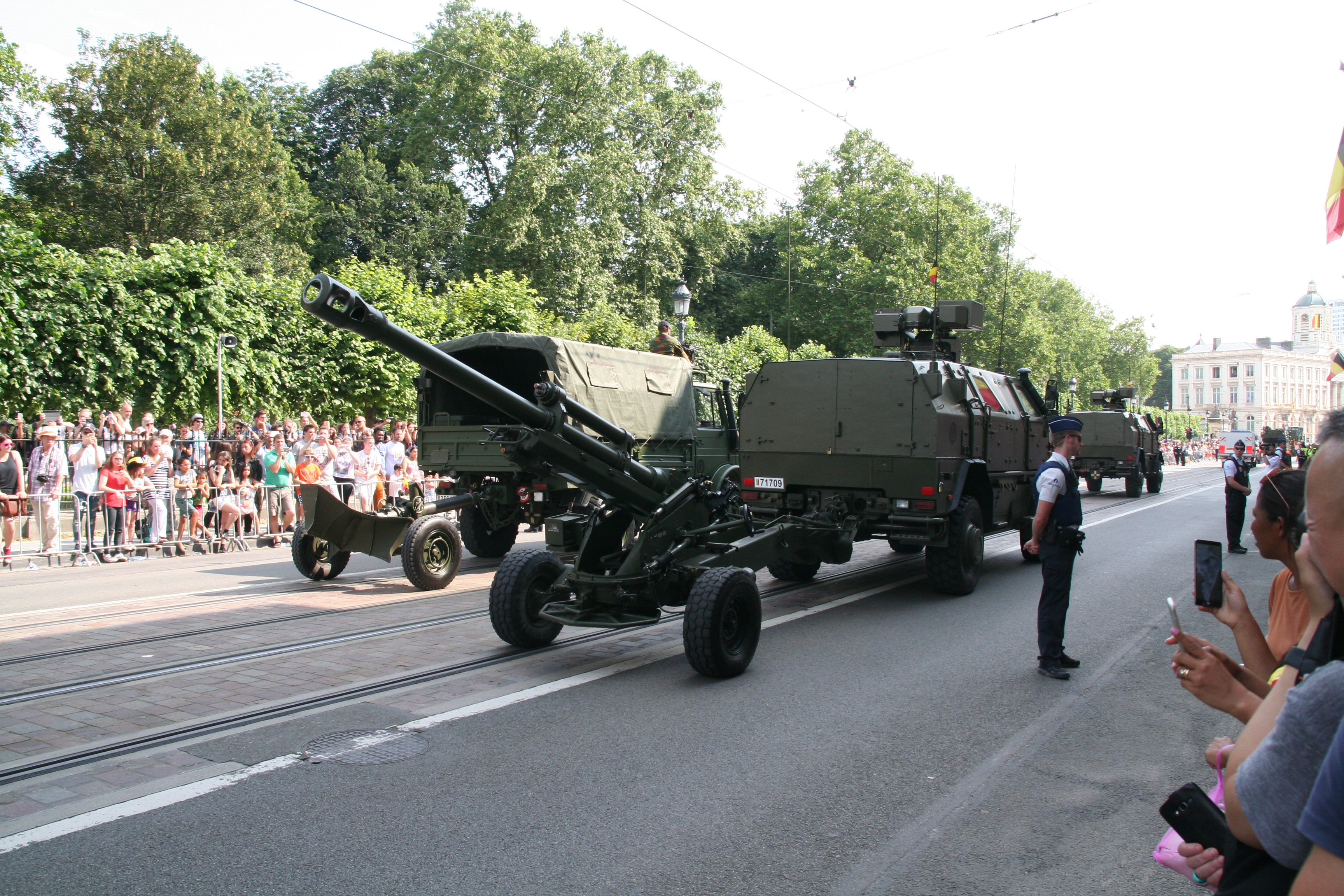 Fête nationale belge à Bruxelles le 21 juillet 2016 - Armée belge (Défense)